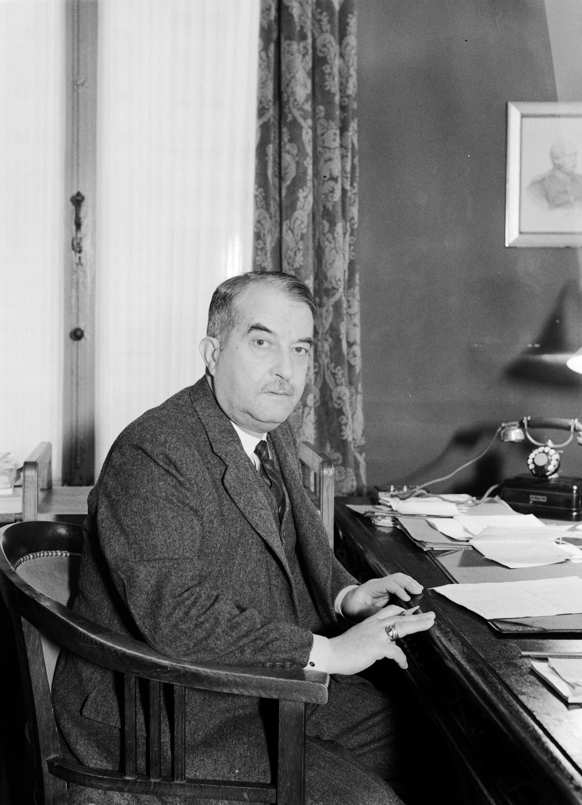 Graf Raban Adelmann von Adelmannsfelden (1877-1935), Duits gezant in Brussel.